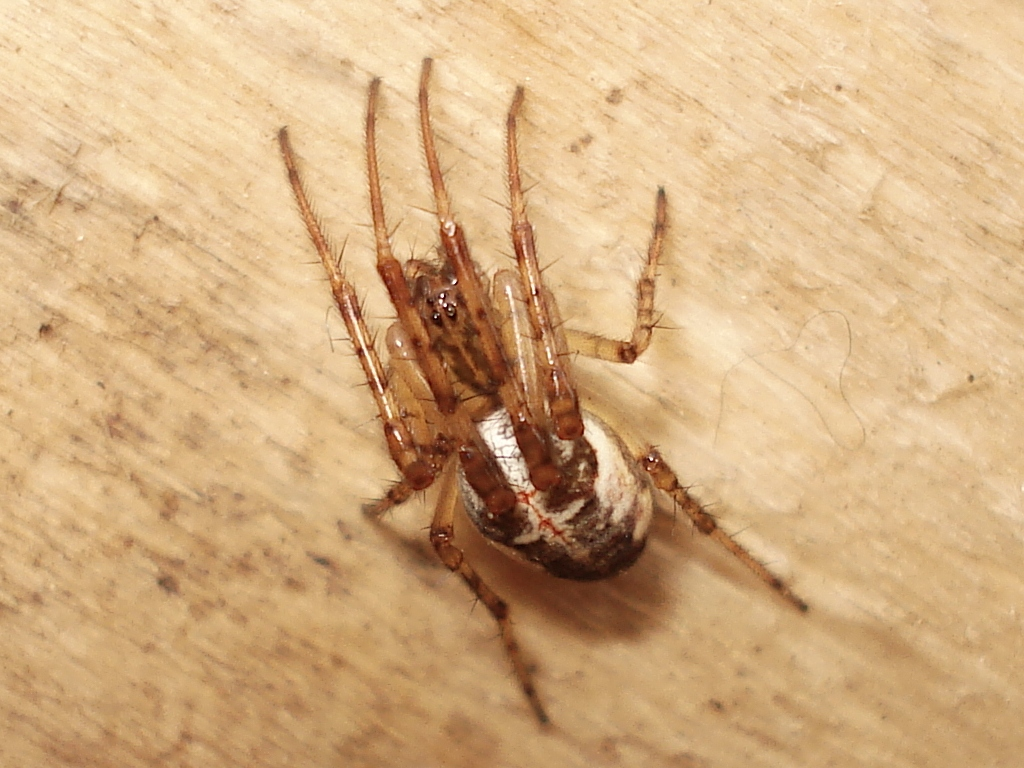 Metellina mengei. Found in Ķēmeri national park, Latvia